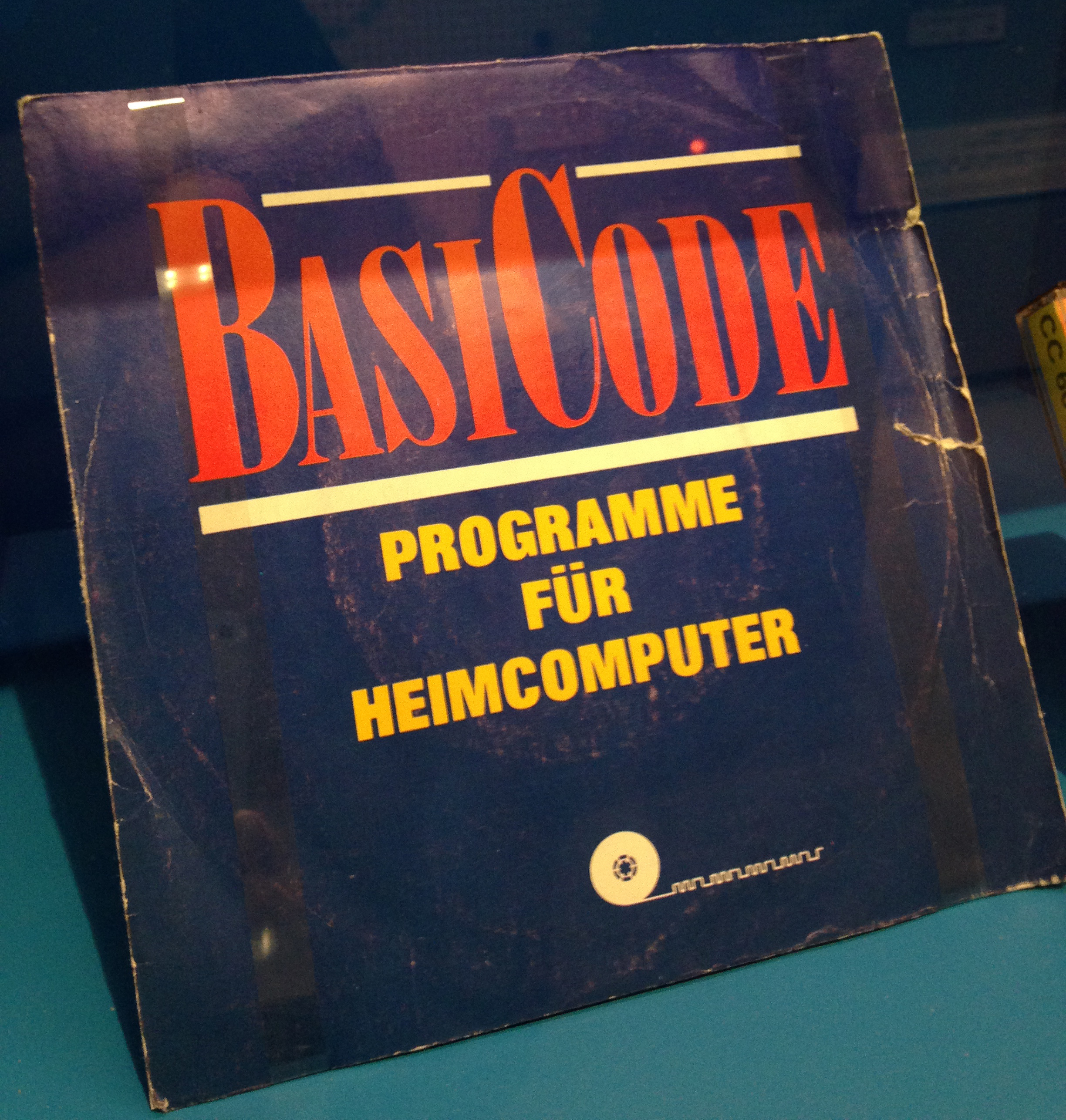 Basiccode Schallpatte